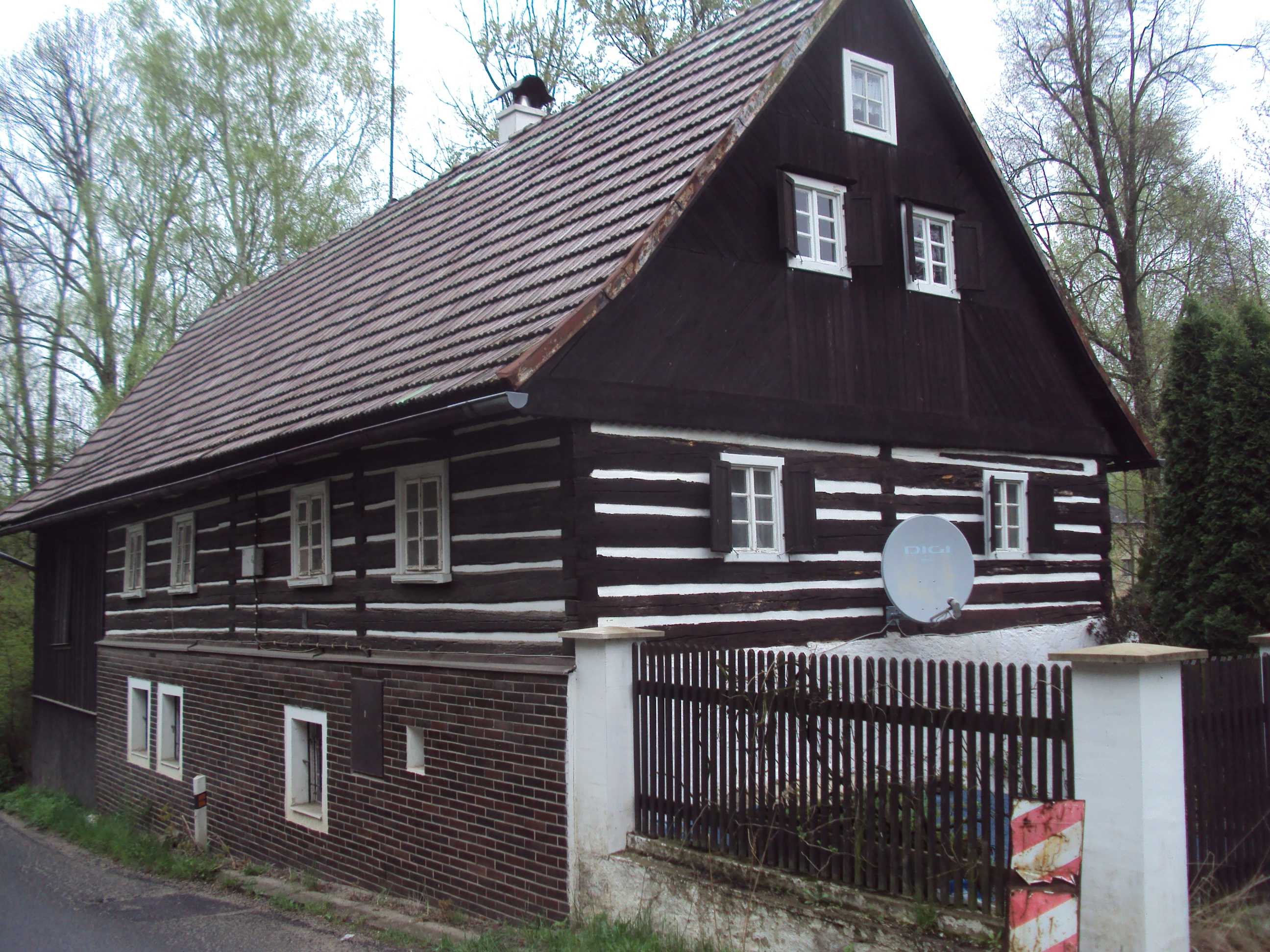 Česky: Dům, kde údajně měl chalupu herec Menšík, silnice podle Ploučnice do Horní Police na Českolipsku